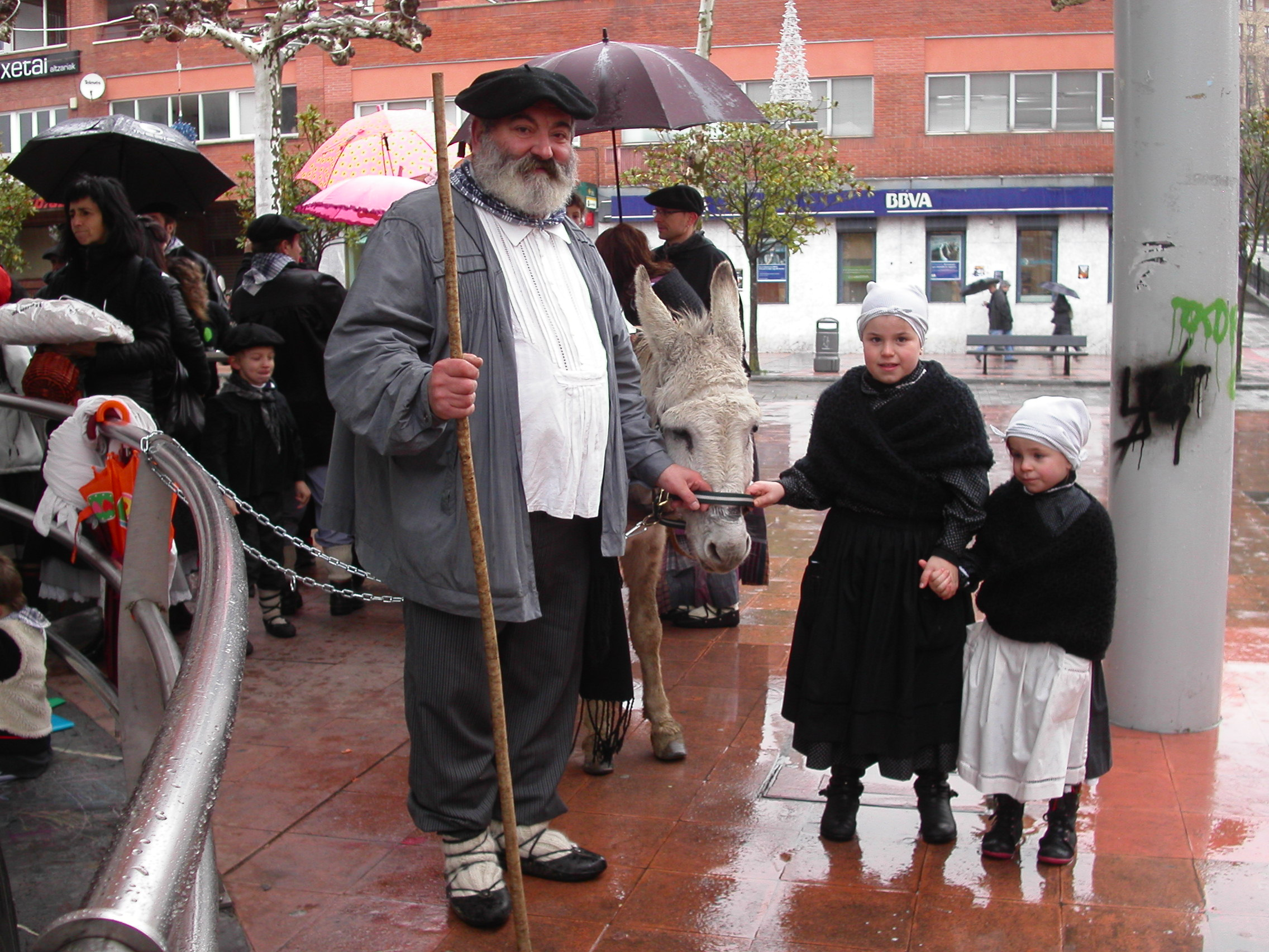 Olentzero Beasainen. Gipuzkoa, Euskal Herria - Olentzero in Beasain. Gipuzkoa, Basque Country